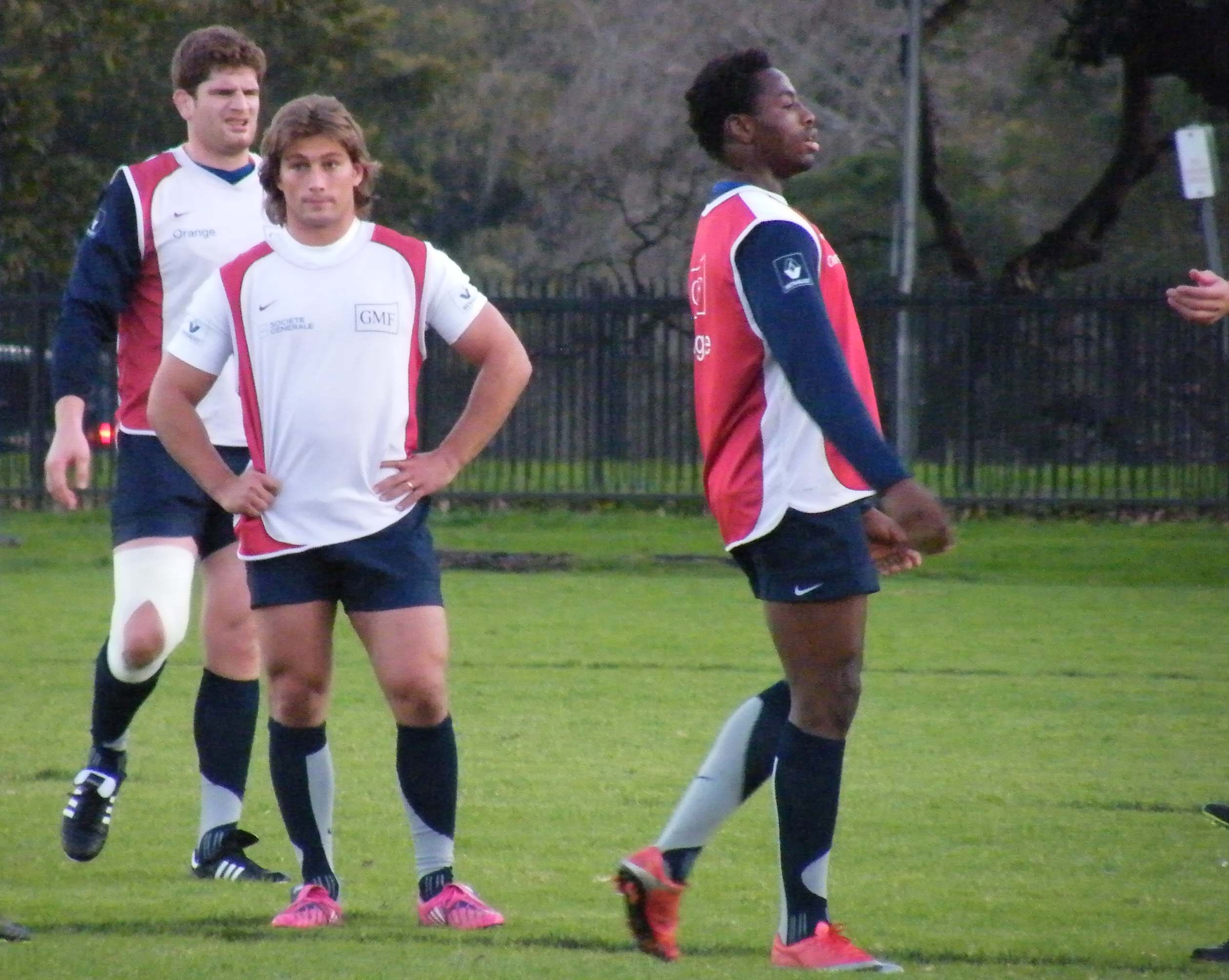 Dimitri Szarzewski - French Rugby Union Training - Moore Park, Sydney 23 June 2009